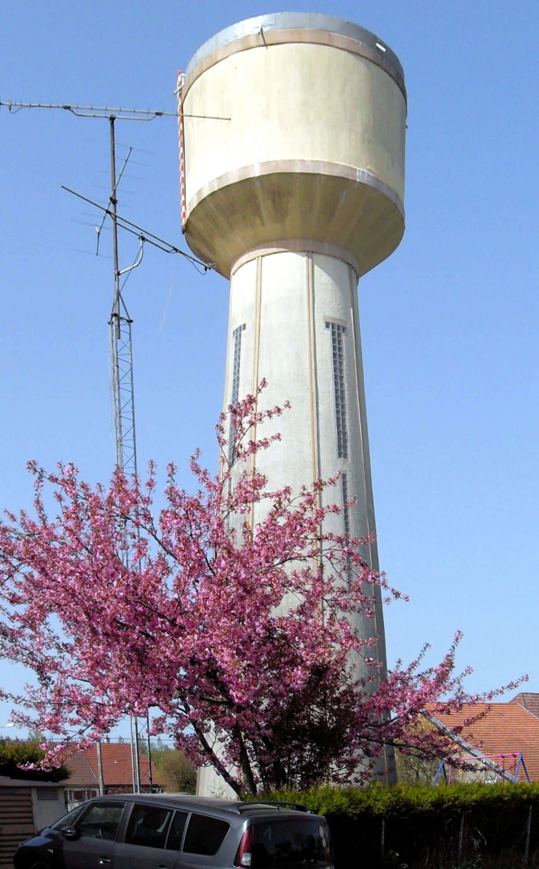 Le château d'eau de Foussemagne